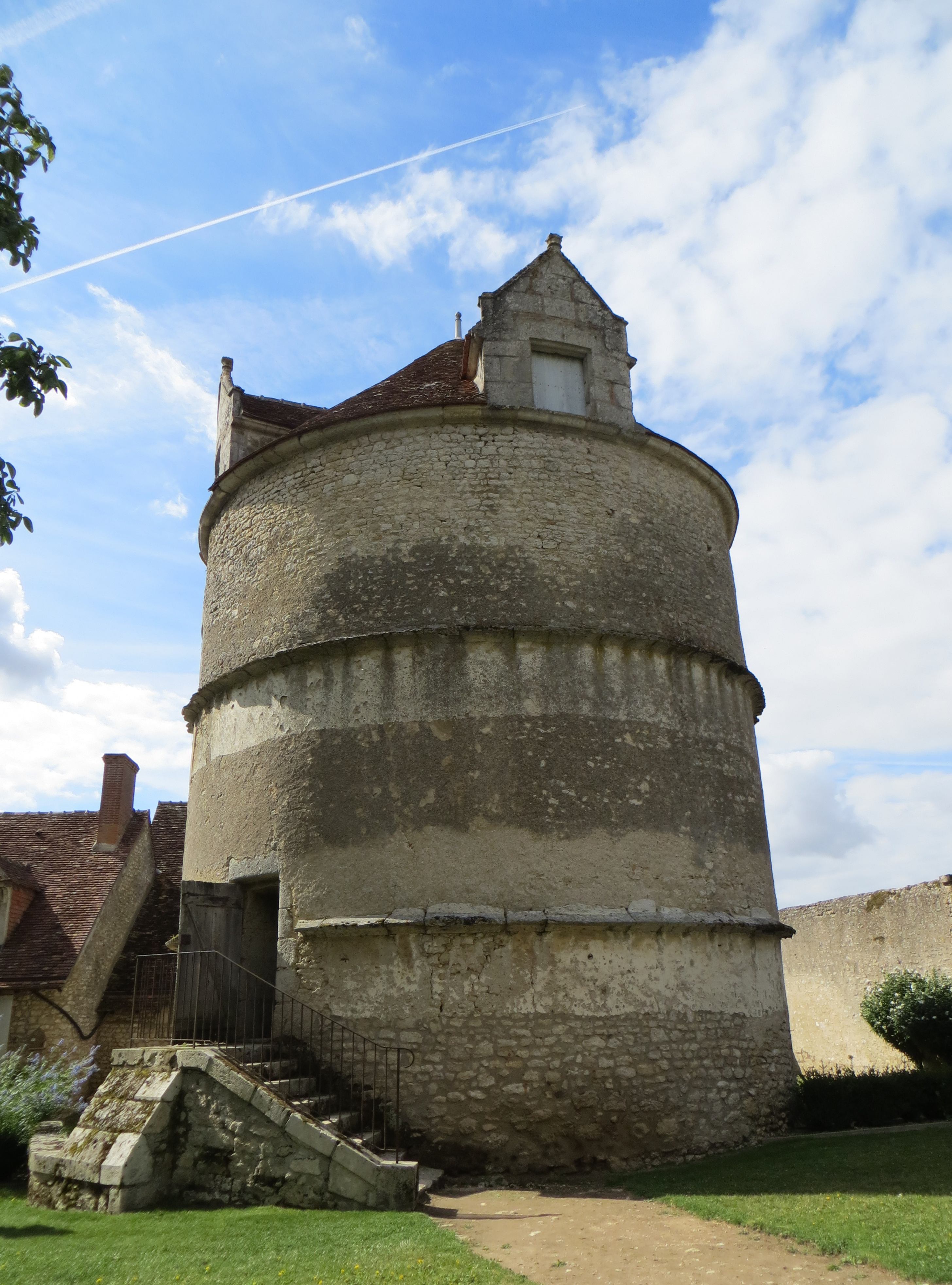 Pigeonnier du Château de Talcy .